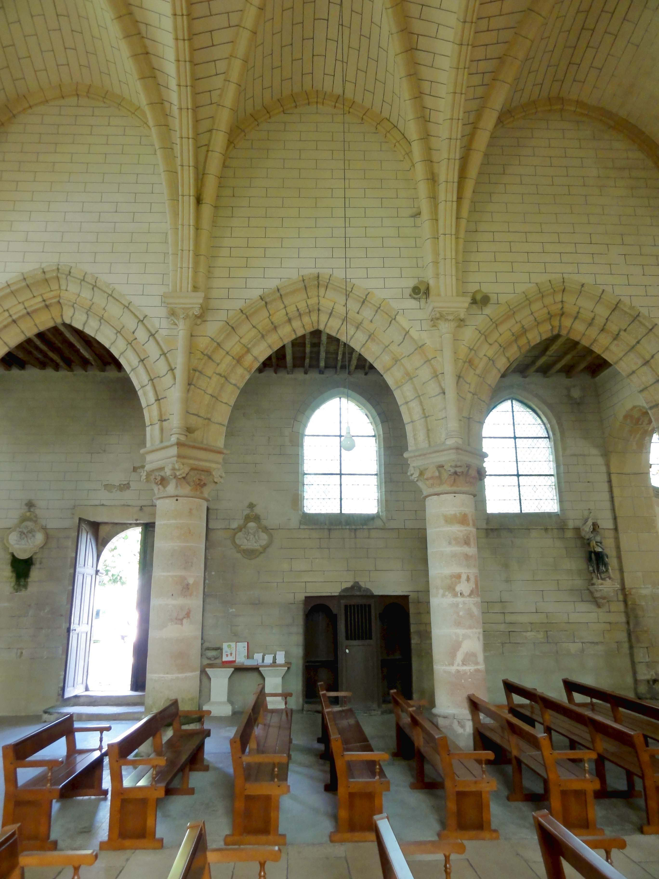 Intérieur de l'église - voir titre.